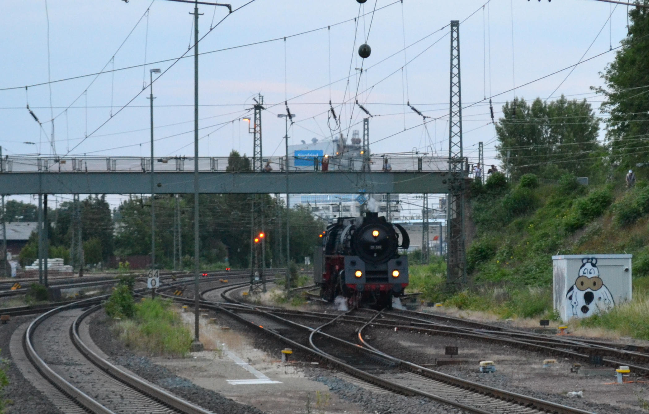 Lok 01 519 im Bahnhof Minden (Westf.) auf dem Gleis zum alten Betriebswerk Minden.